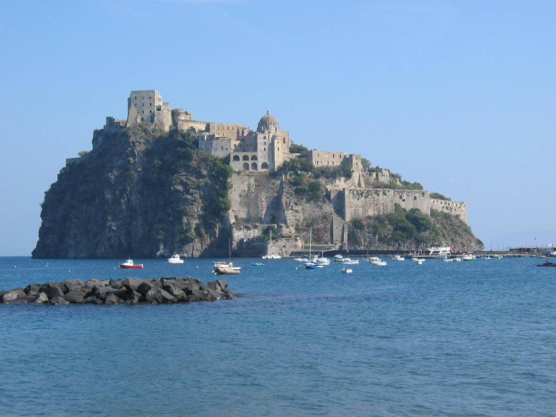 Photo of Il Castello Aragonese (2004), Ischia, Italy